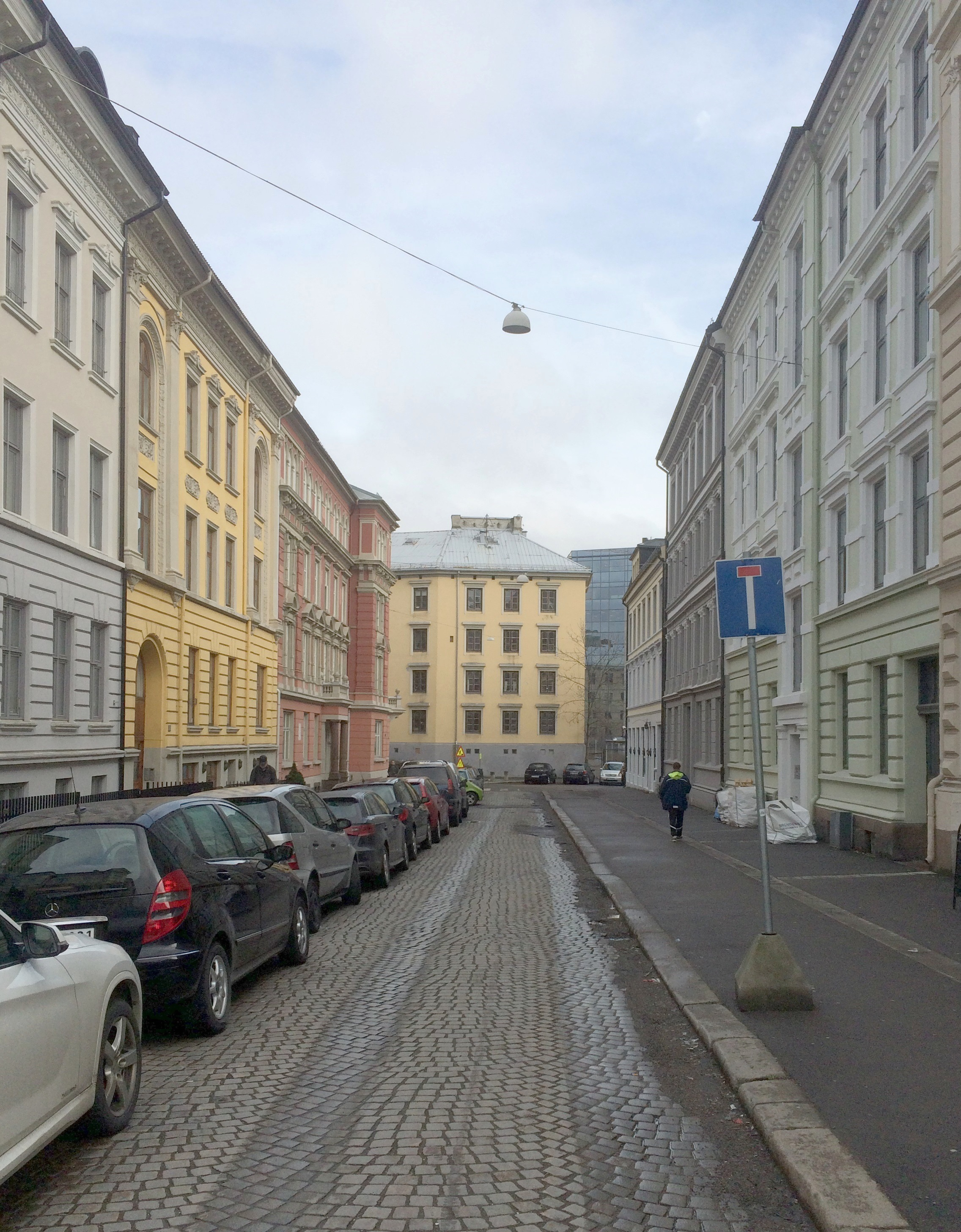 Observatoriegata sørøstover